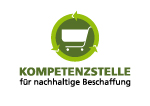 Logo der Kompetenzstelle für nachhaltige BEschaffung